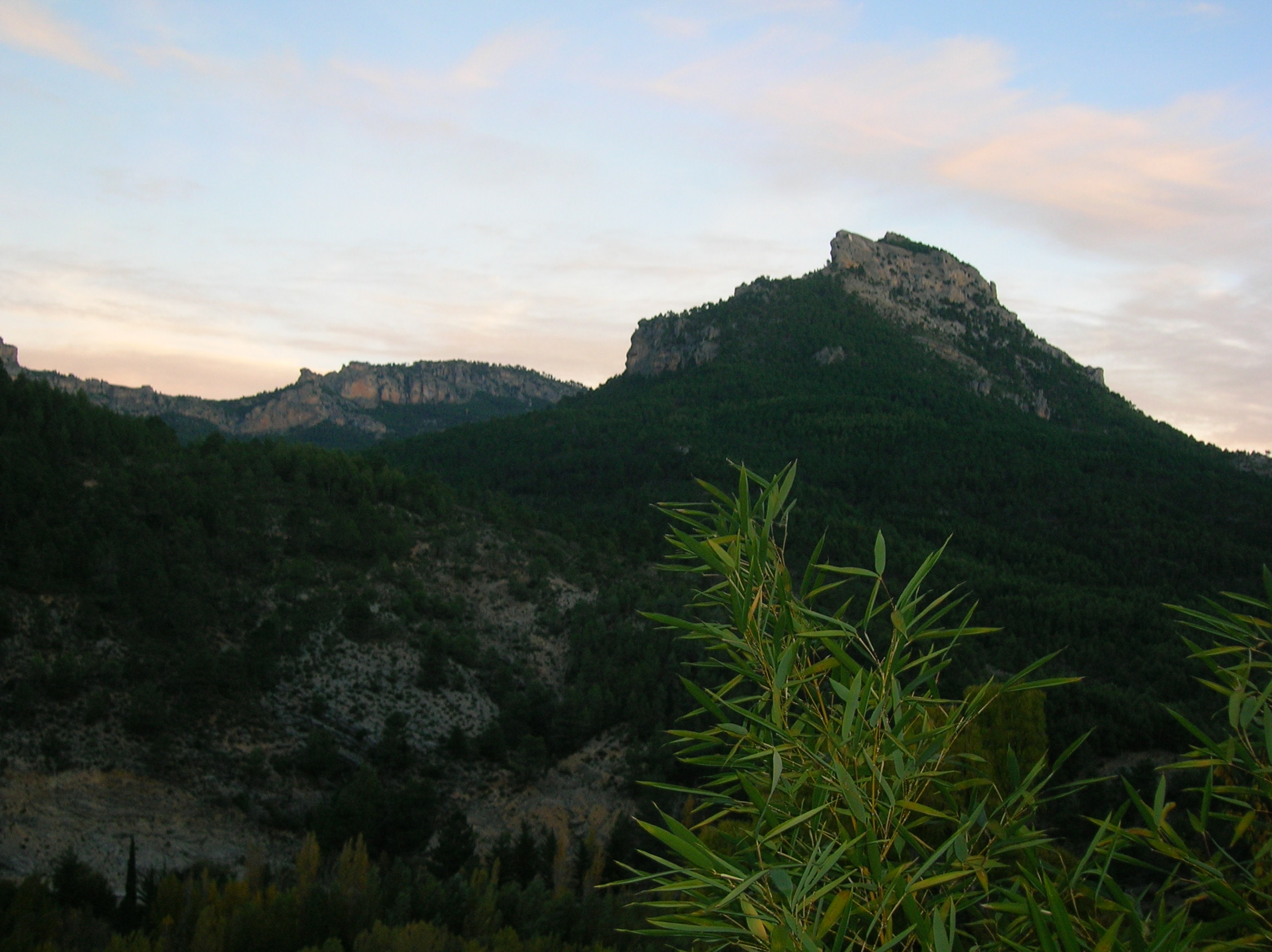 SPANISH